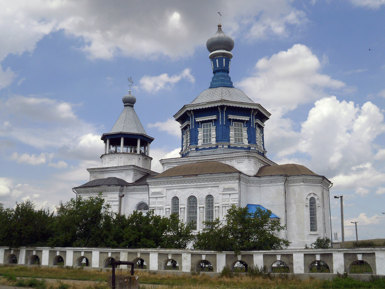 с. Луганское Донецкой области